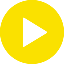 팟플레이어 신 로고